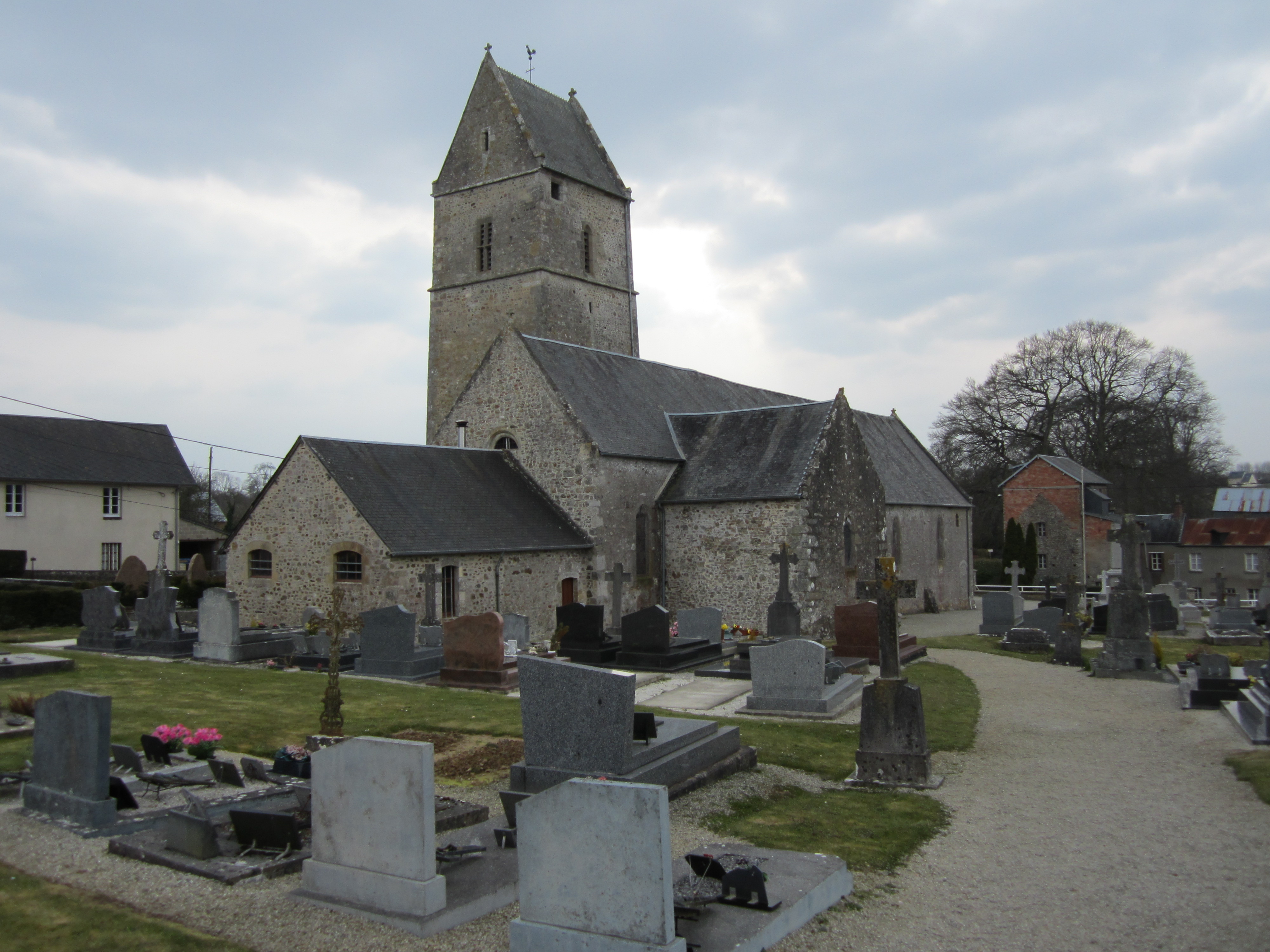 Église Saint-Pierre de Muneville-le-Bingard